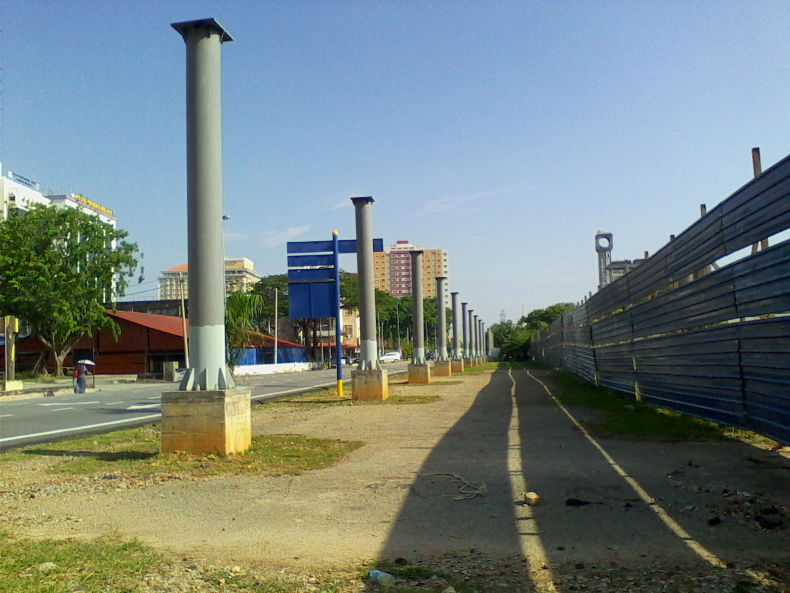 Laluan monorel melaka yang tidak disiapkan.